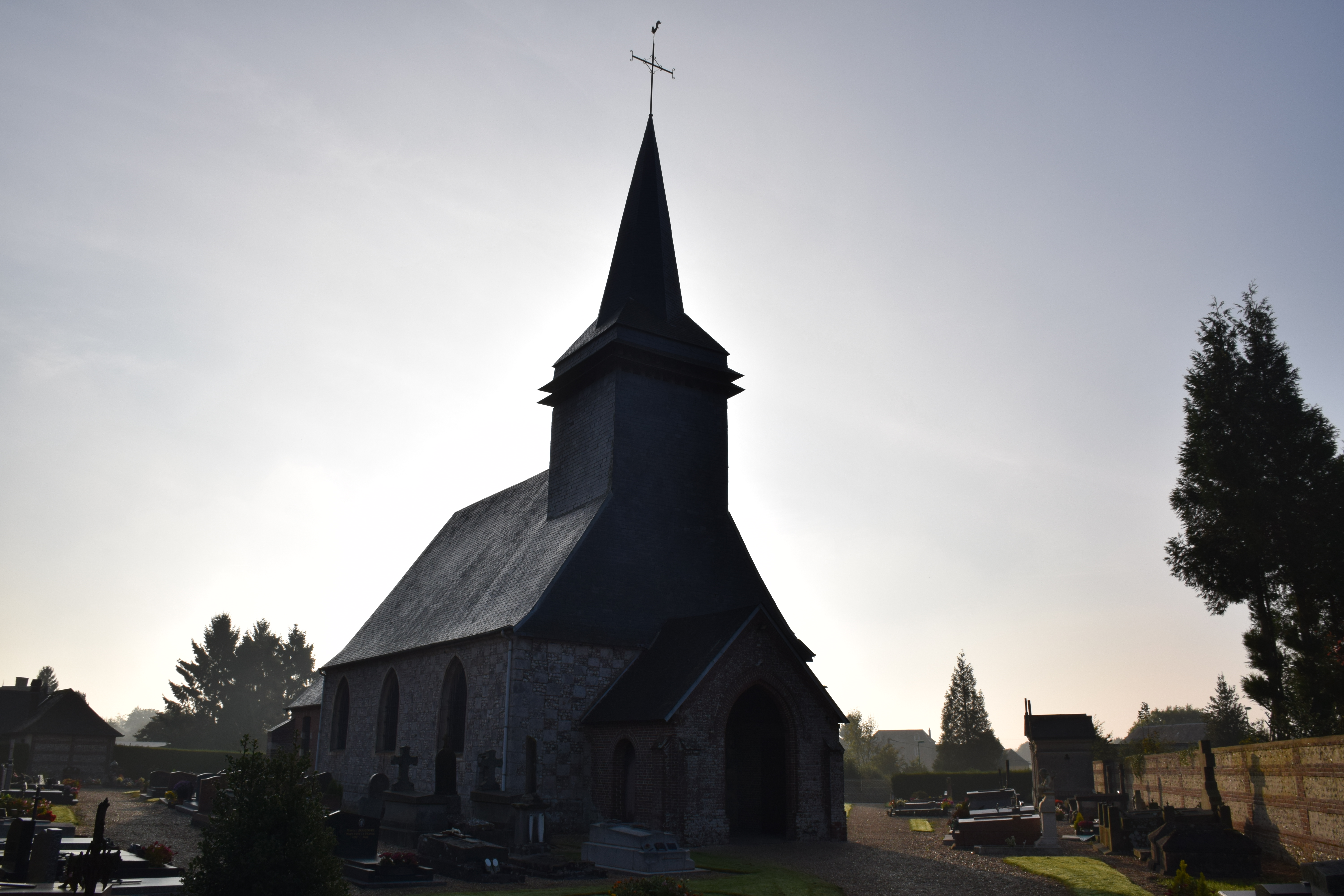 Eglise Notre-Dame